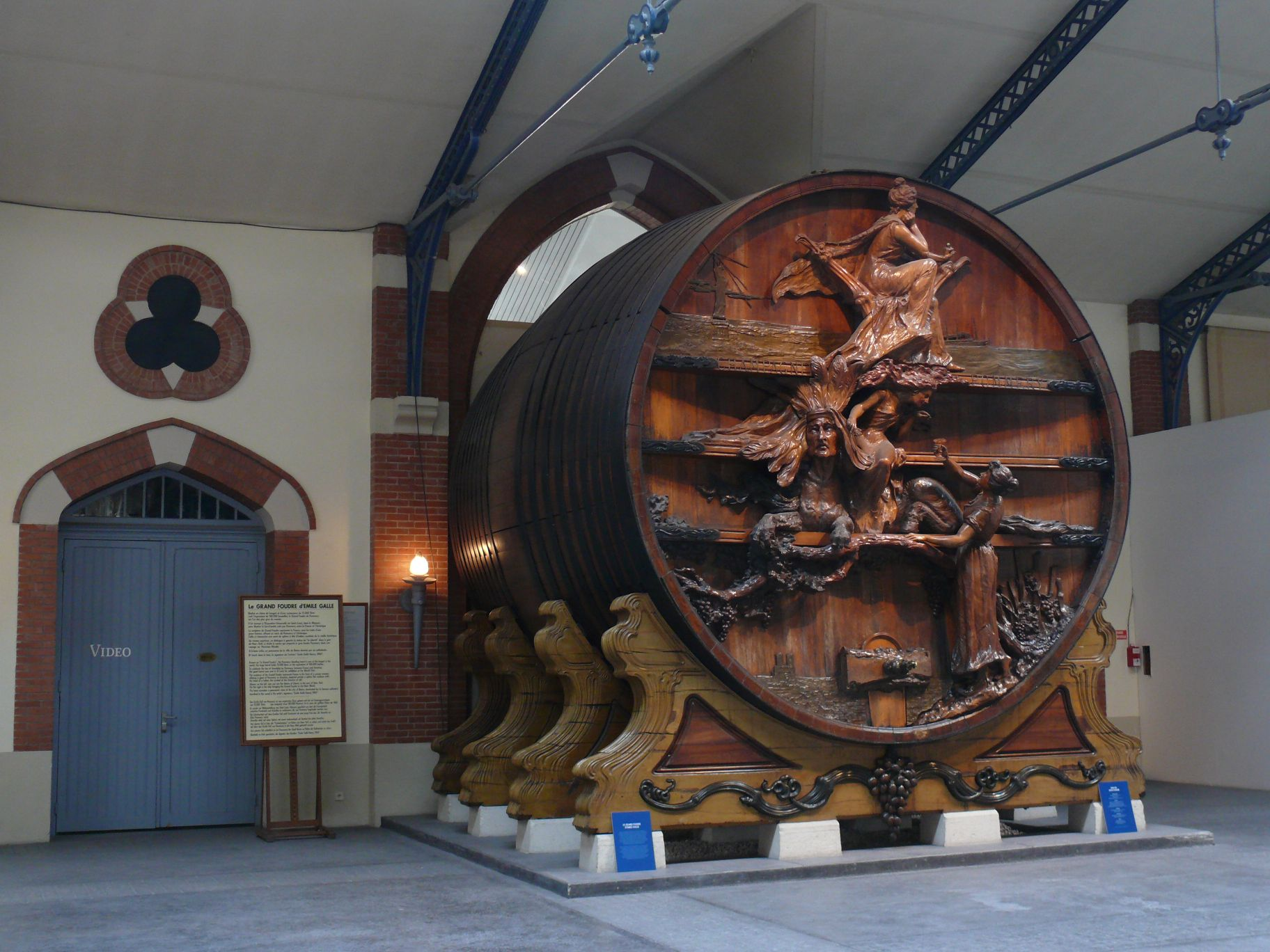 Le Grand foudre d'Émile Gallé dans le domaine Pommery, à Reims (Marne, Champagne-Ardenne, France).